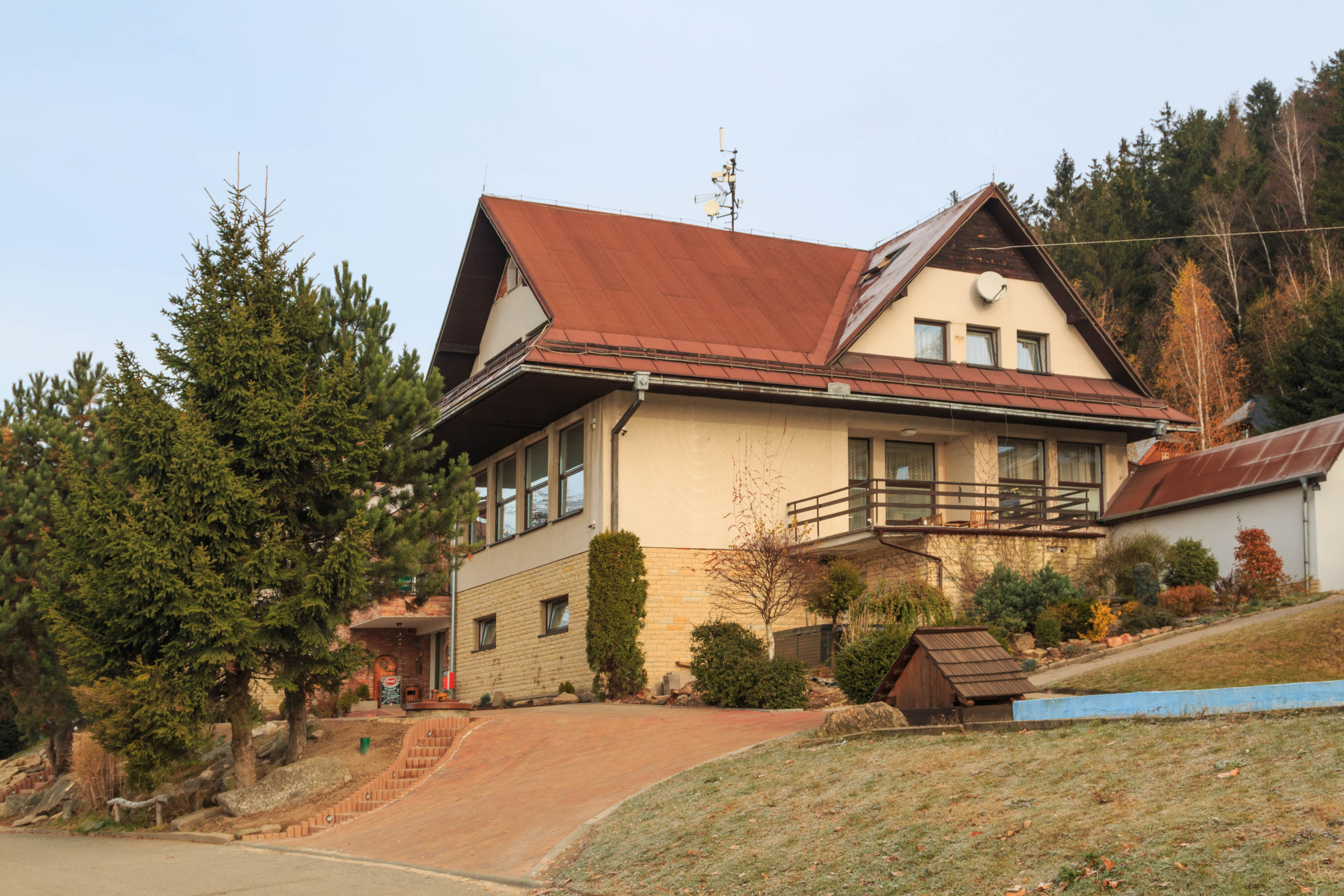 Podlesí u Sněžného - hotel